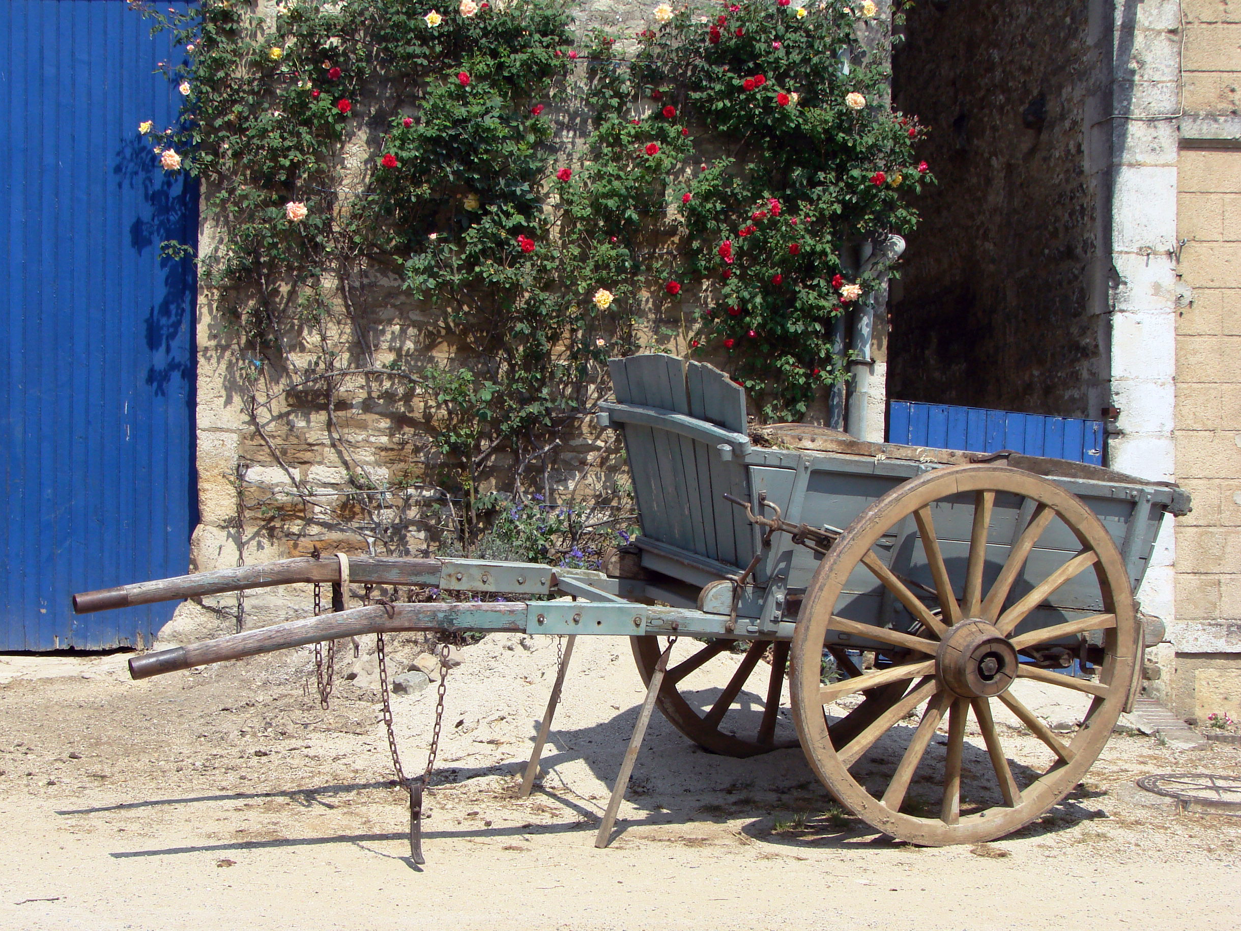 Tombereau, voiture de charge pour traction animale montée sur deux roues, photographié dans un village ardennais.